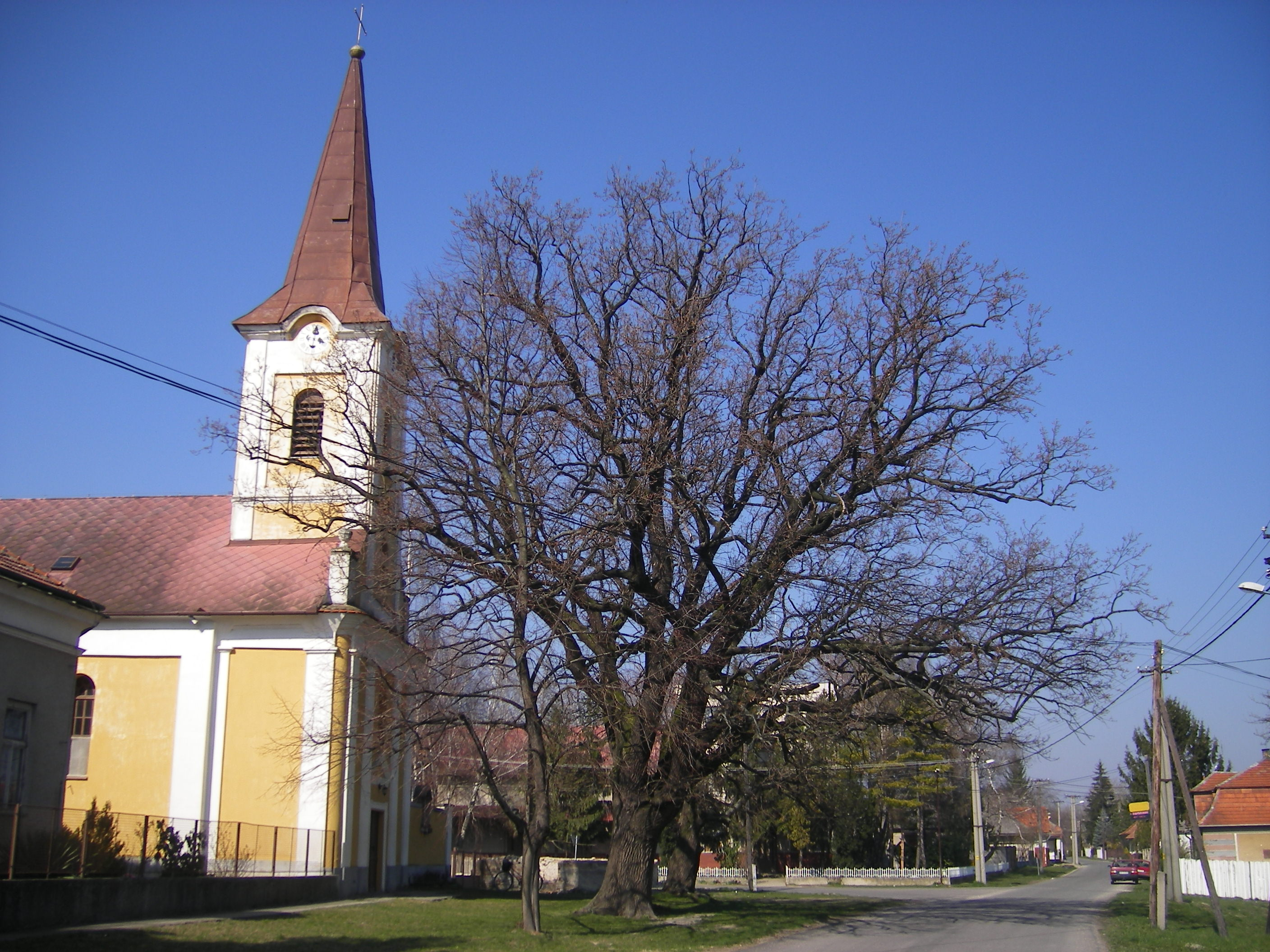 Csicsó, katolikus templom